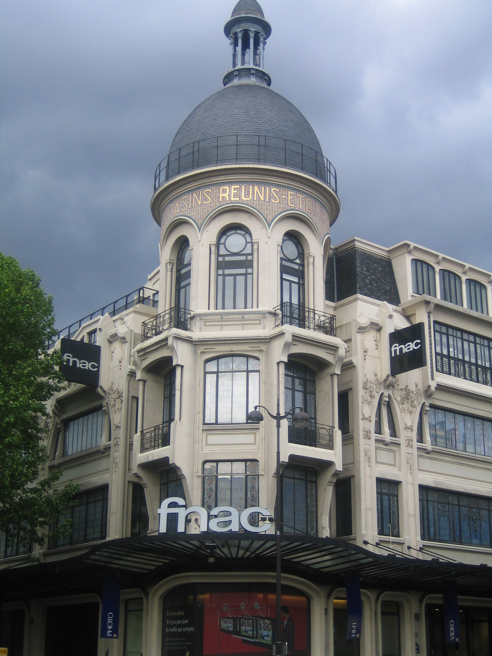 Fnac des Ternes à Paris (Île-de-France, France).